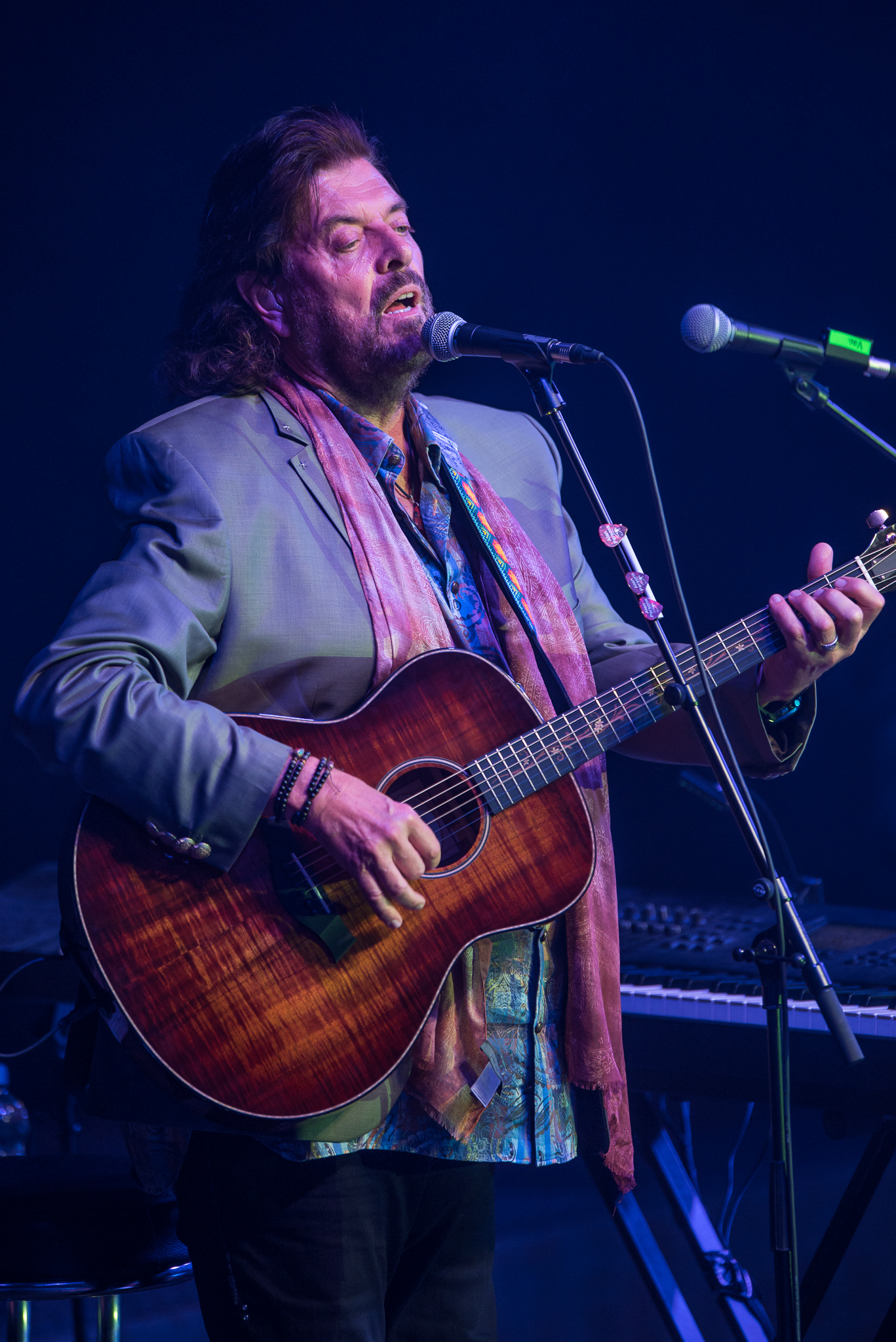 Alan Parsons Live Project,Concertbüro Franken,Konzert,Livekonzert,Livemusik,Meistersingerhalle,Musik